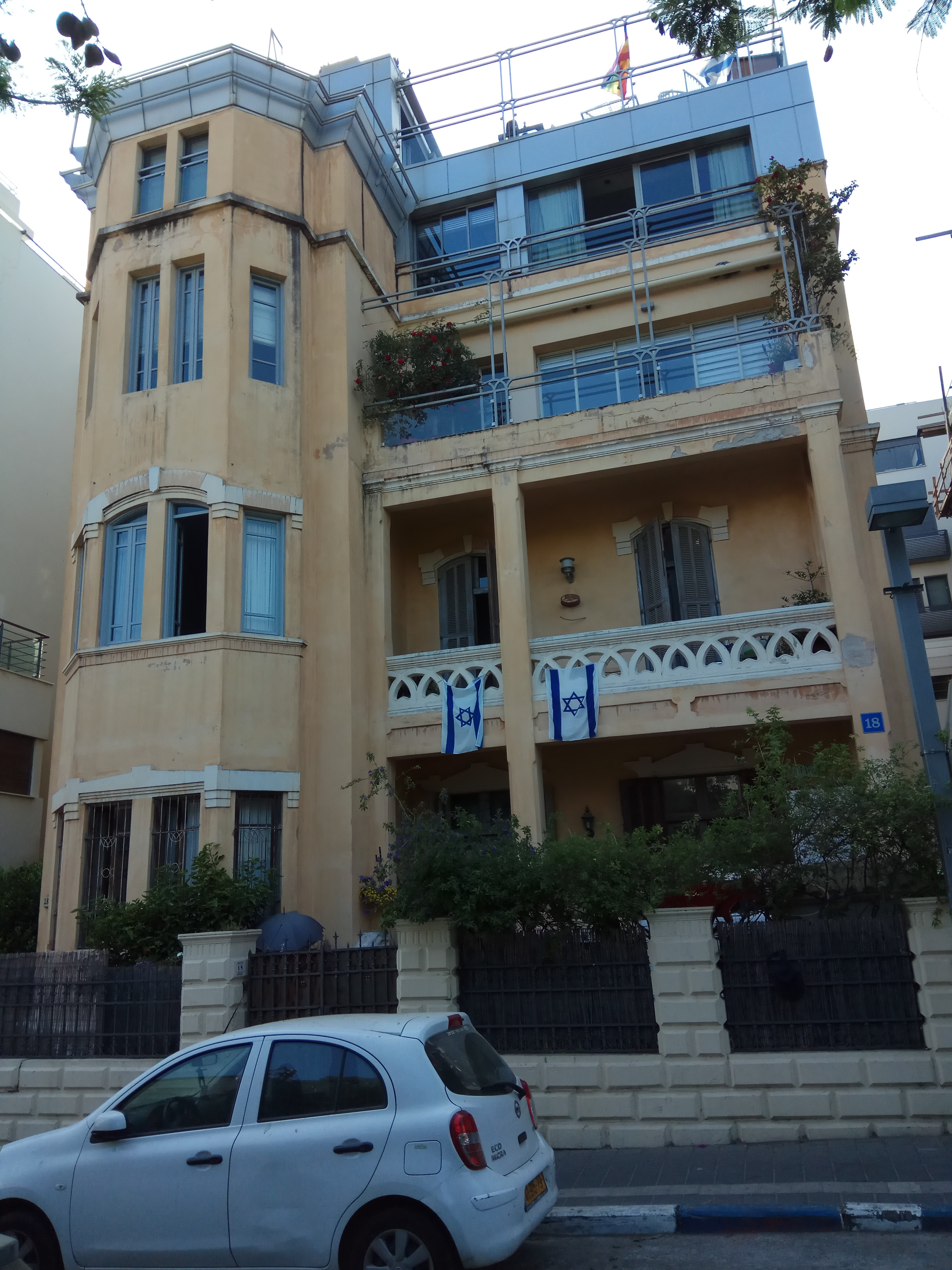 בית גמנסיה נורדיה לשעבר ברח' יוחנן הסנדלר 18 בתל אביב